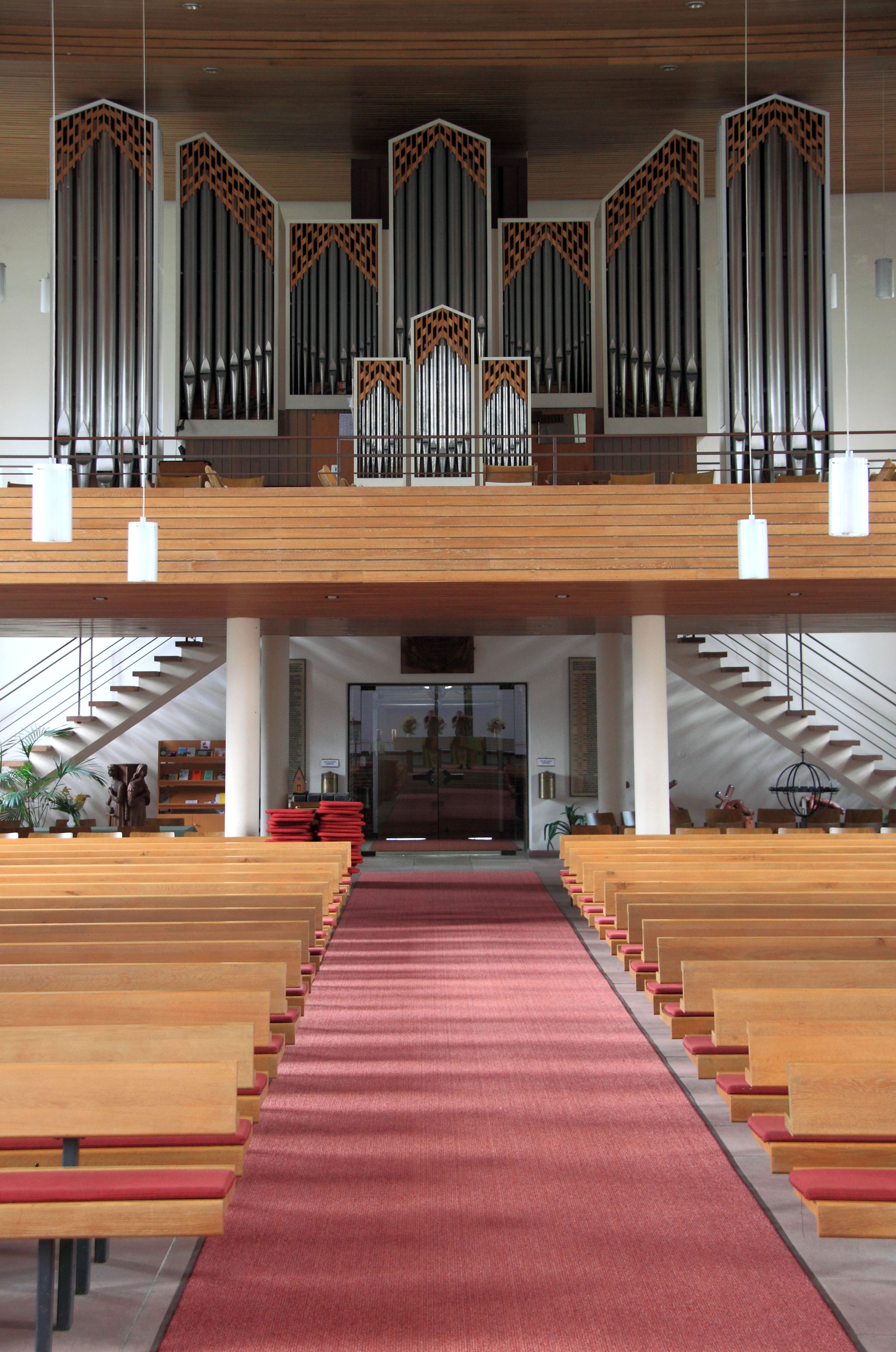 Orgel in der Stadtkirche Delmenhorst, Niedersachsen